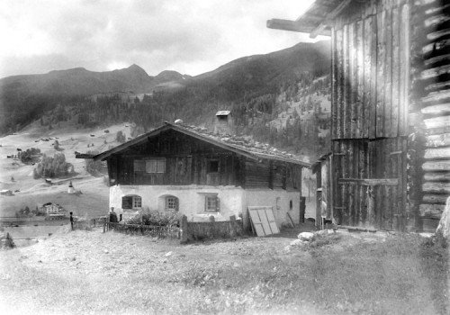 Fotografie von Ernst Ludwig Kirchner: Wildbodenhaus